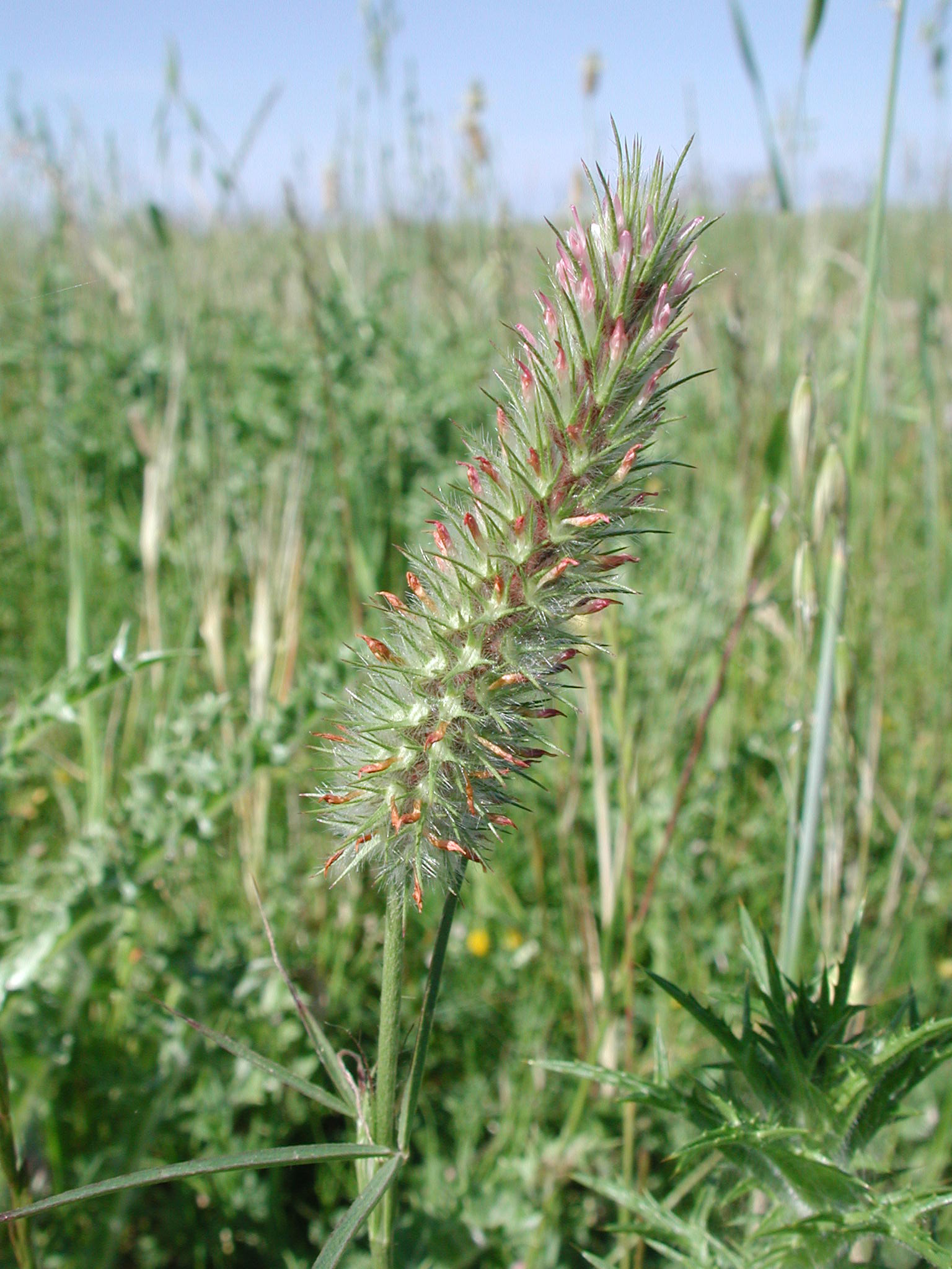 Infiorescenza di Trifolium angustifolium